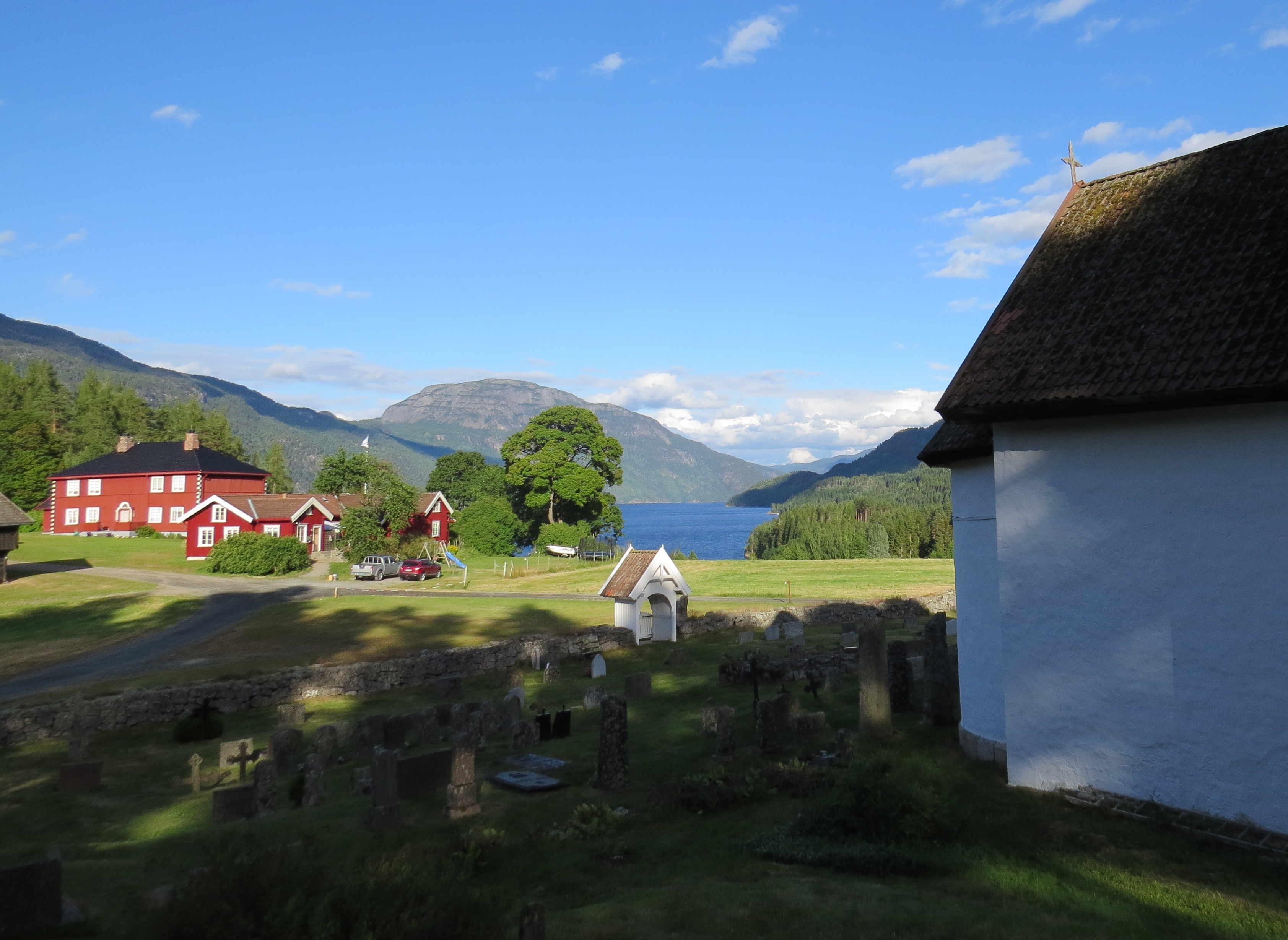 Kviteseid Gård ved Kviteseid Kirke, Telemarken i Norge